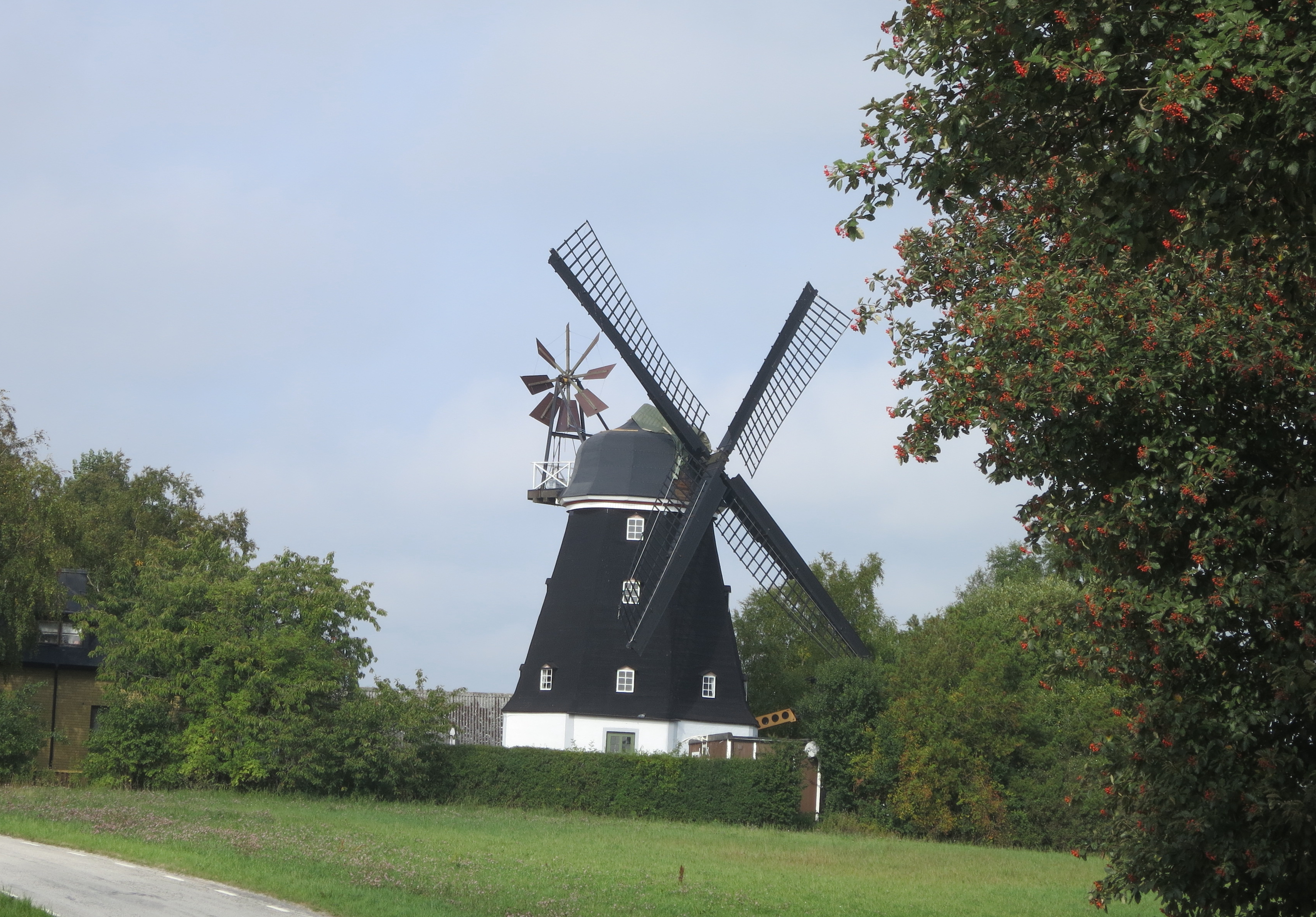 Haga mölla söder om Stehag